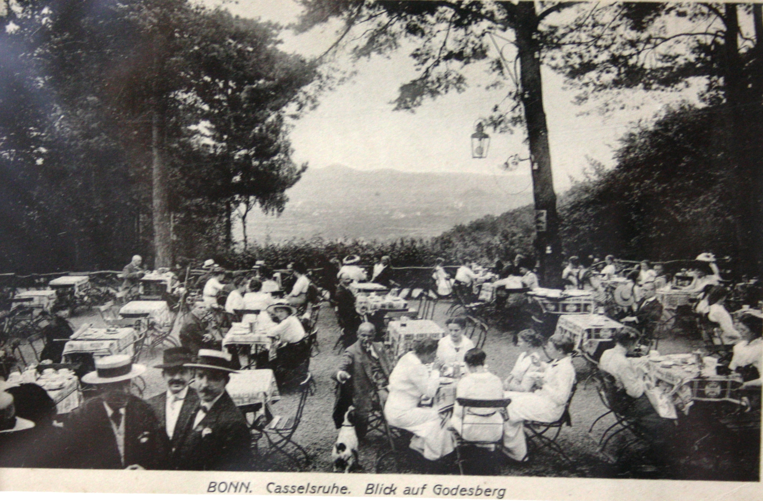 Blick von der Terrasse der Casselsruhe ins Bonner Rheintal, um 1890